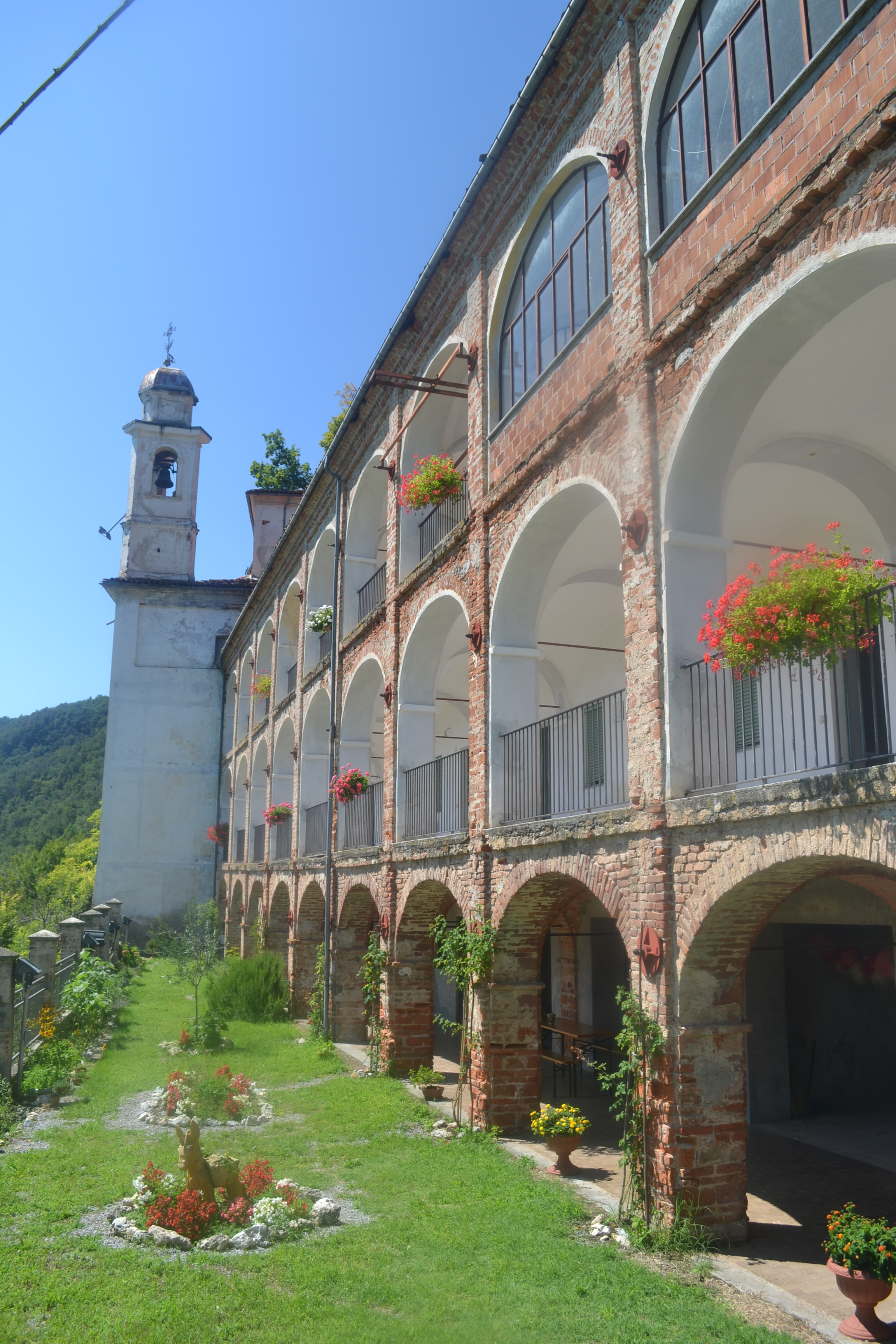 Santuario Santa Lucia Villanova Mondovì - Facciata e campanile, giardino